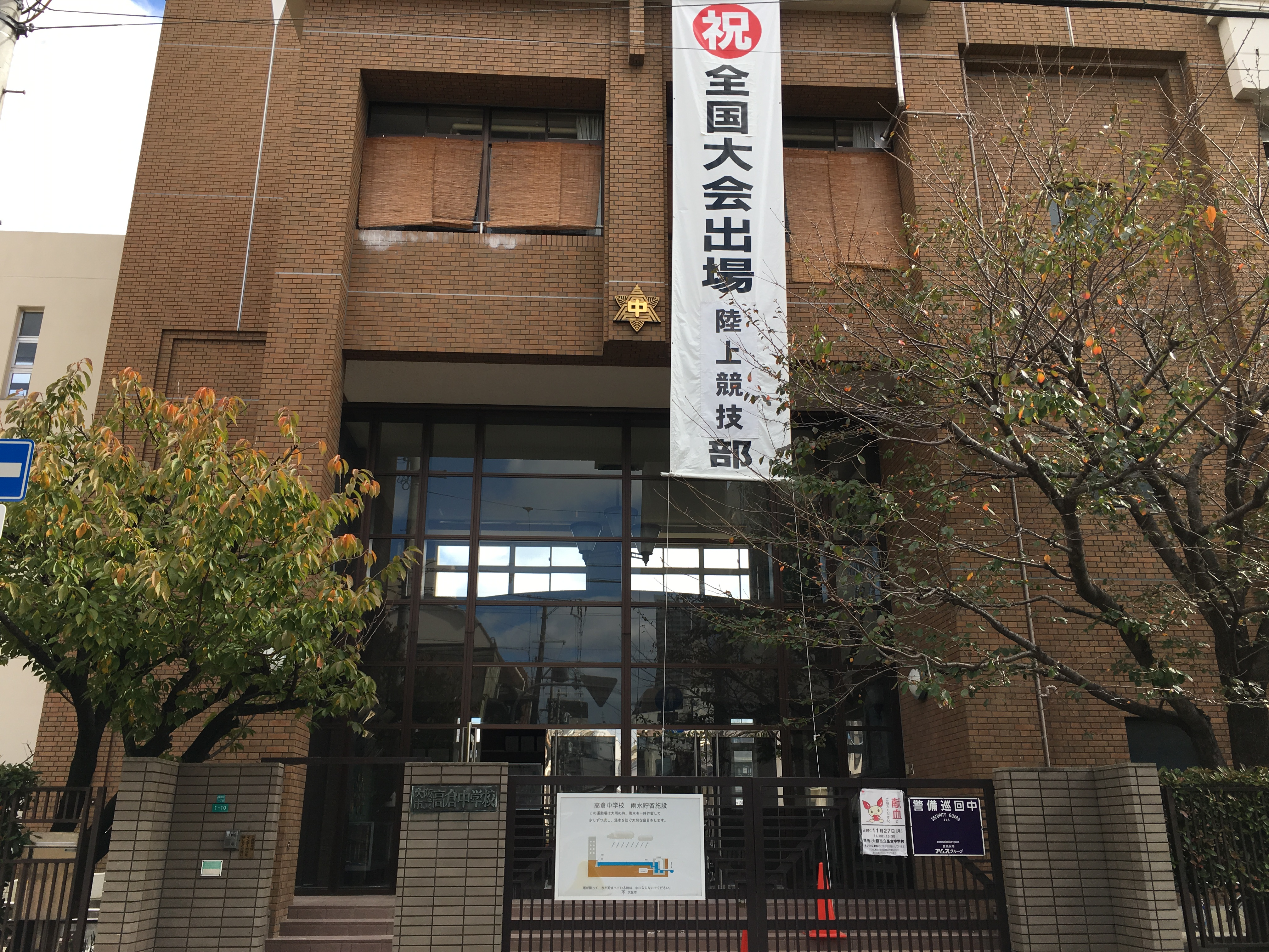 大阪市立高倉中学校